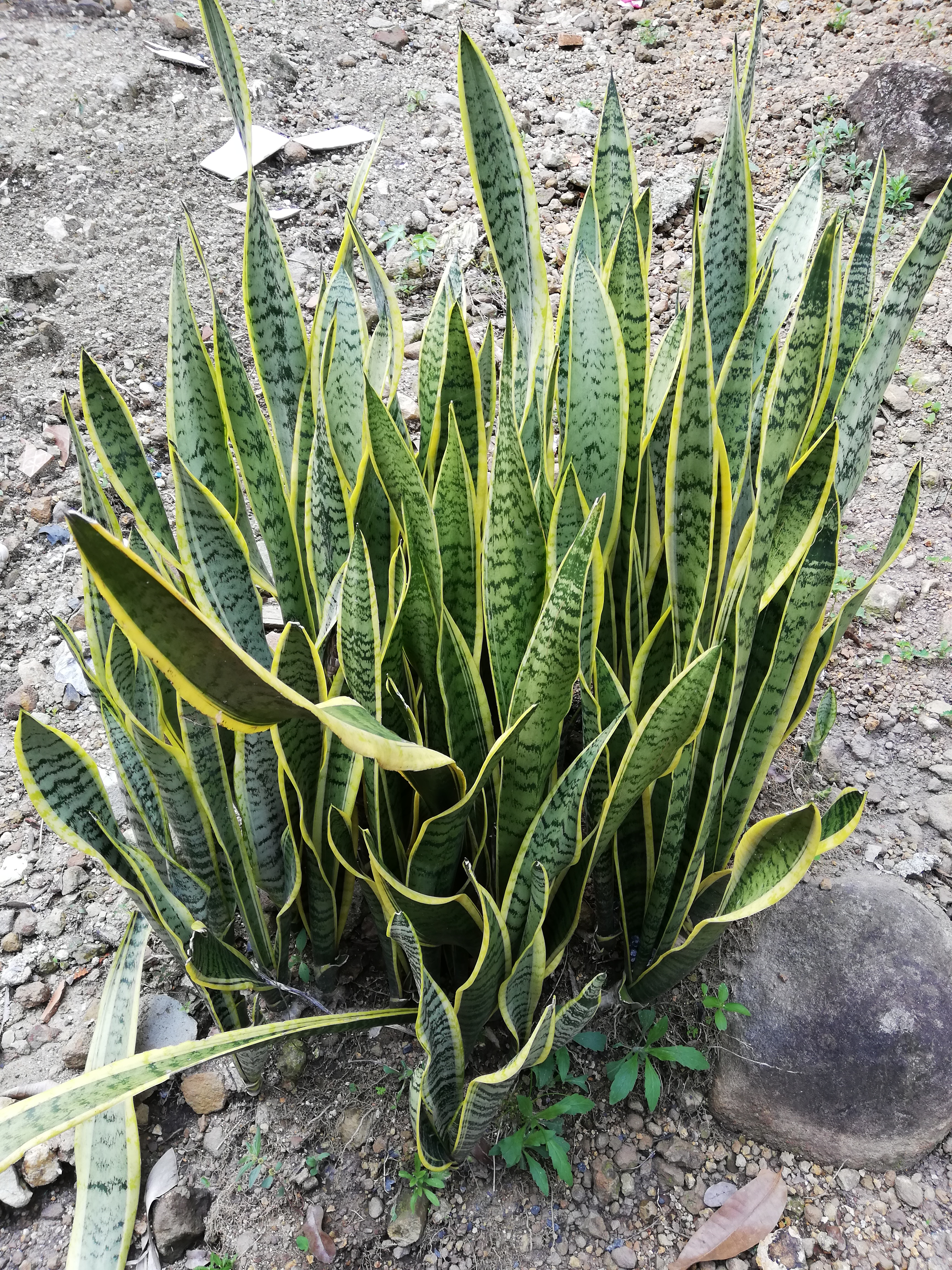 Sansevieria trifasciata en zonas rurales de Ibagué, Tolima, Colombia.